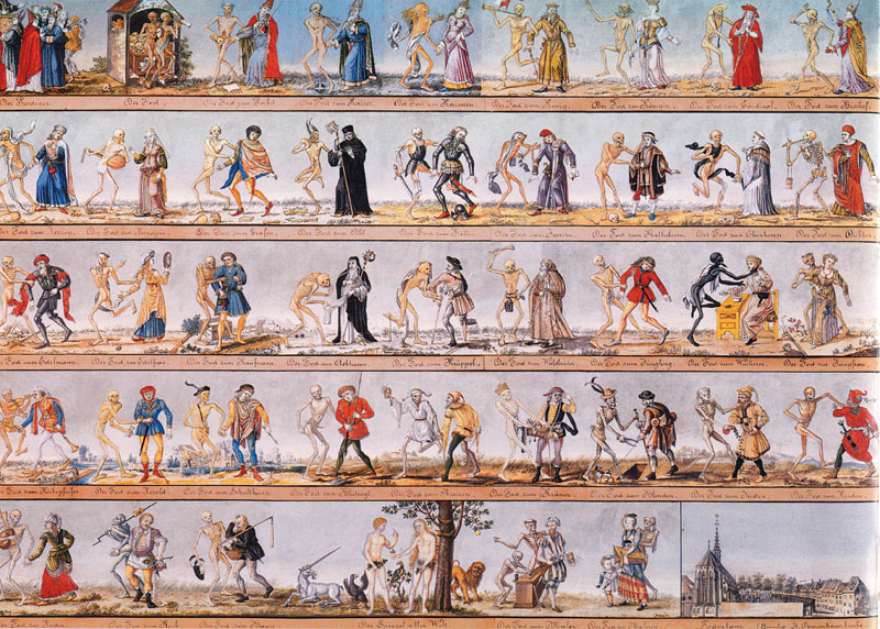 Johann Rudolf Feyerabend: Der Prediger Totentanz, Aquarellkopie von 1806.